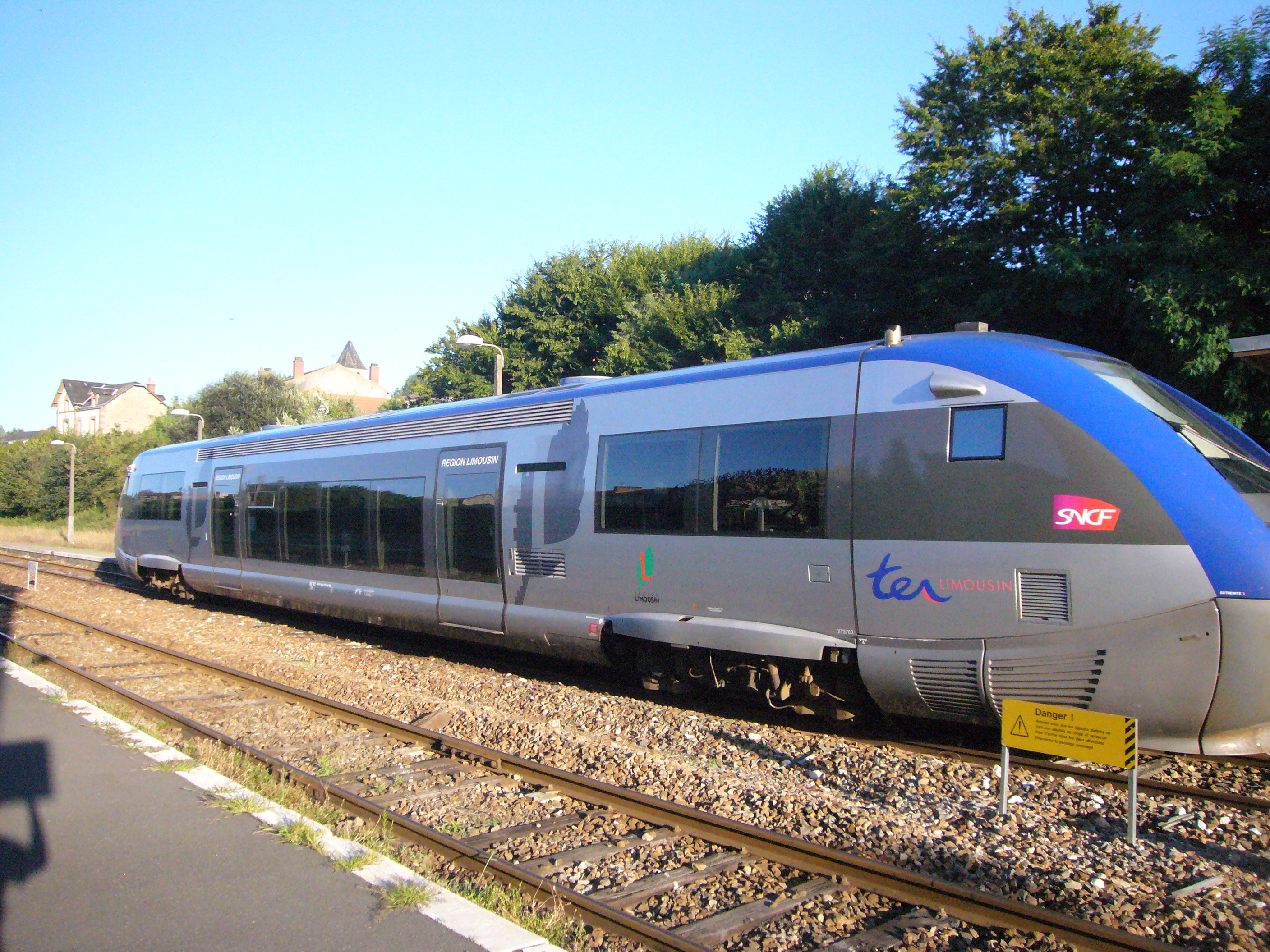 TER Limousin en gare de Chabanais (Charente)